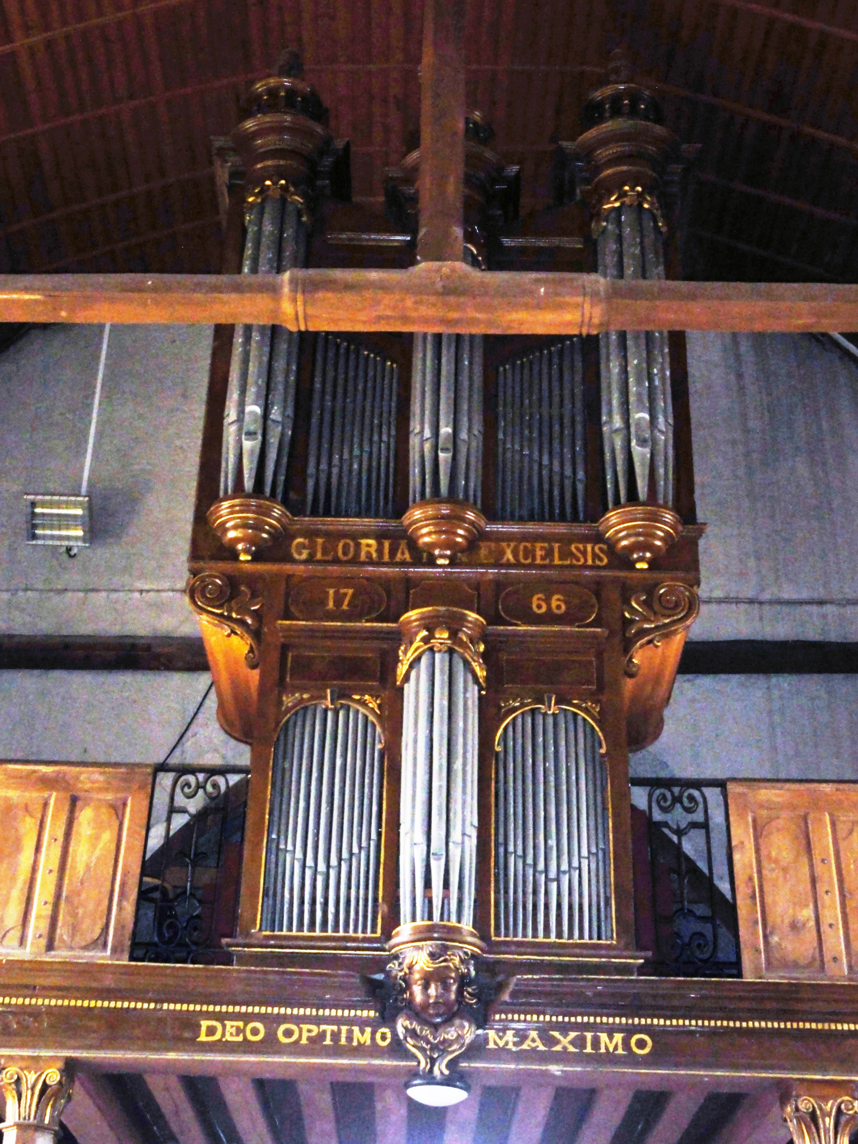 Marolles-les-Braults (Sarthe) église, le buffet d'orgues